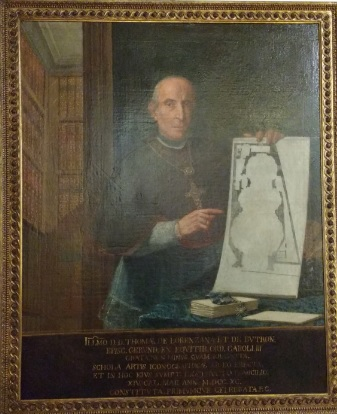 Retrat del Bisbe Tomàs de Lorenzana Tècnica: Oli sobre tela Datació: 1790 Mides: 144 x 119 cm (amb marc) Autoria: Manuel Tramulles Roig Museu d'Història de Girona